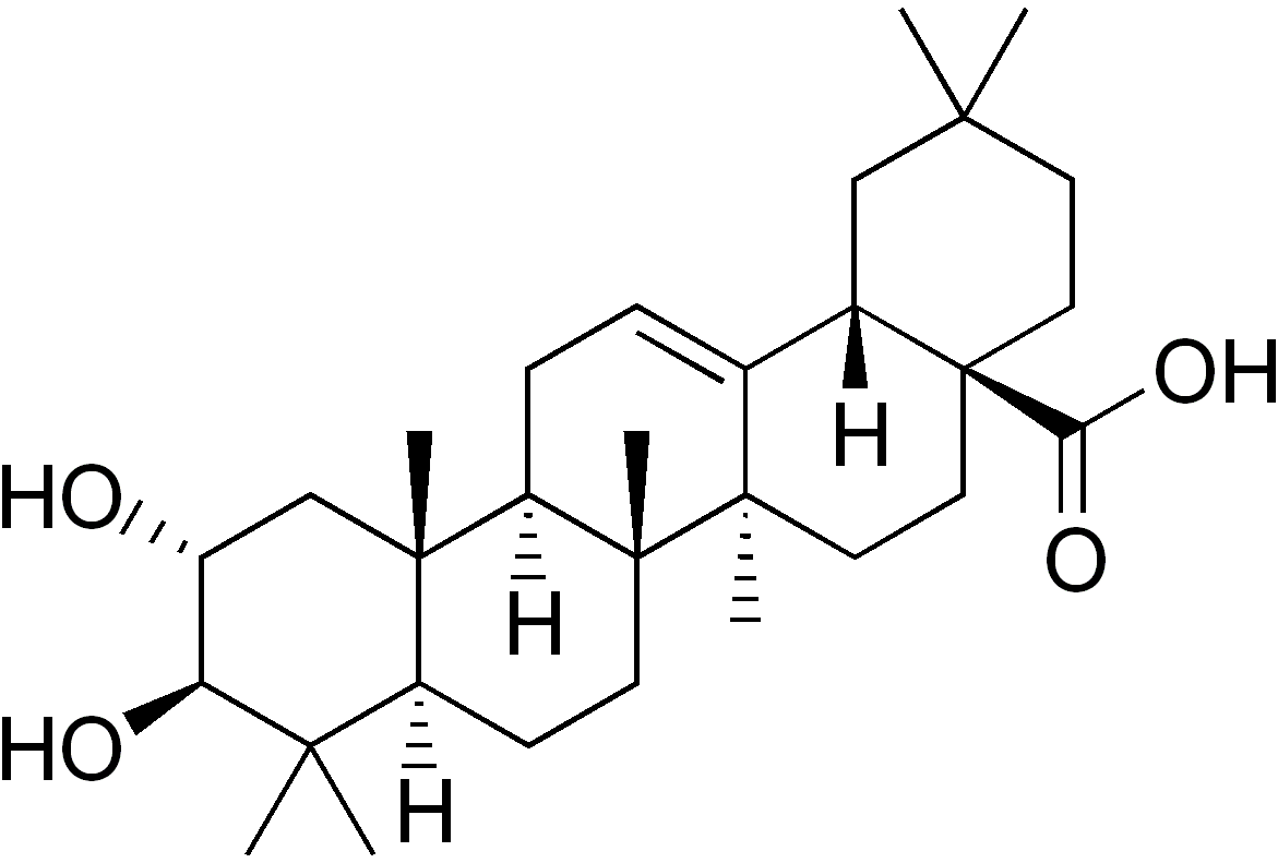 Maslinic acid